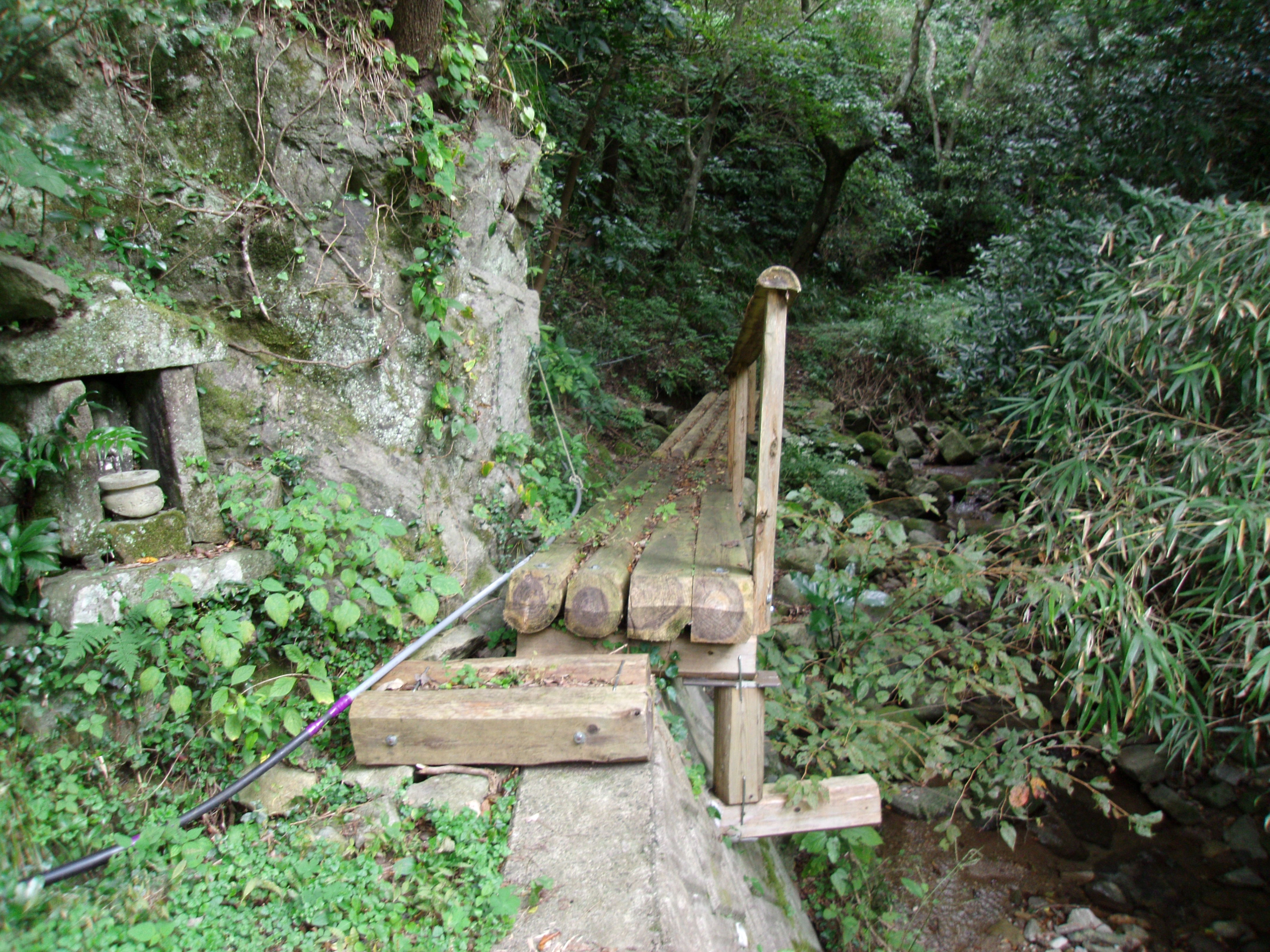 世界遺産「石見銀山」の構成資産である銀山街道温泉津沖泊道 五老橋界隈で降路坂は終わり